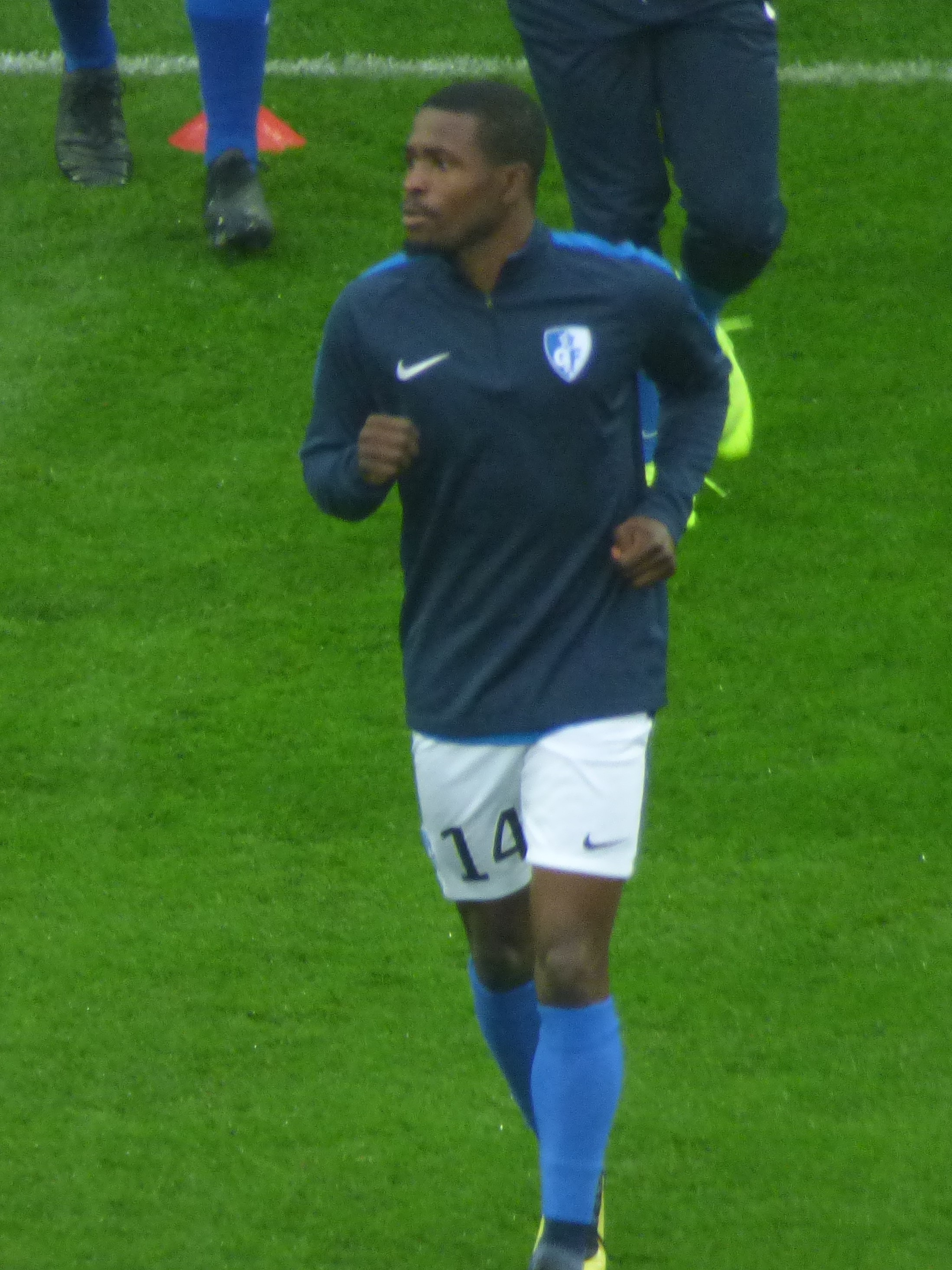 Francis Dady Ngoye avant le match RC Lens / Grenoble Foot 38, le 24 novembre 2018, comptant pour la quinzième journée du championnat de France de football de Ligue 2 2018-2019, au Stade Bollaert-Delelis.